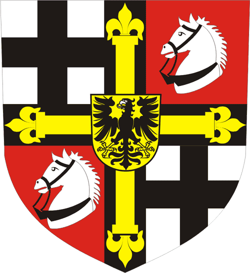 Teutonic Order - Coat of Arms of the Grandmaster Wappen des Hoch-und Deutschmeisters des Deutschen Ordens Georg Hund von Wenckheim